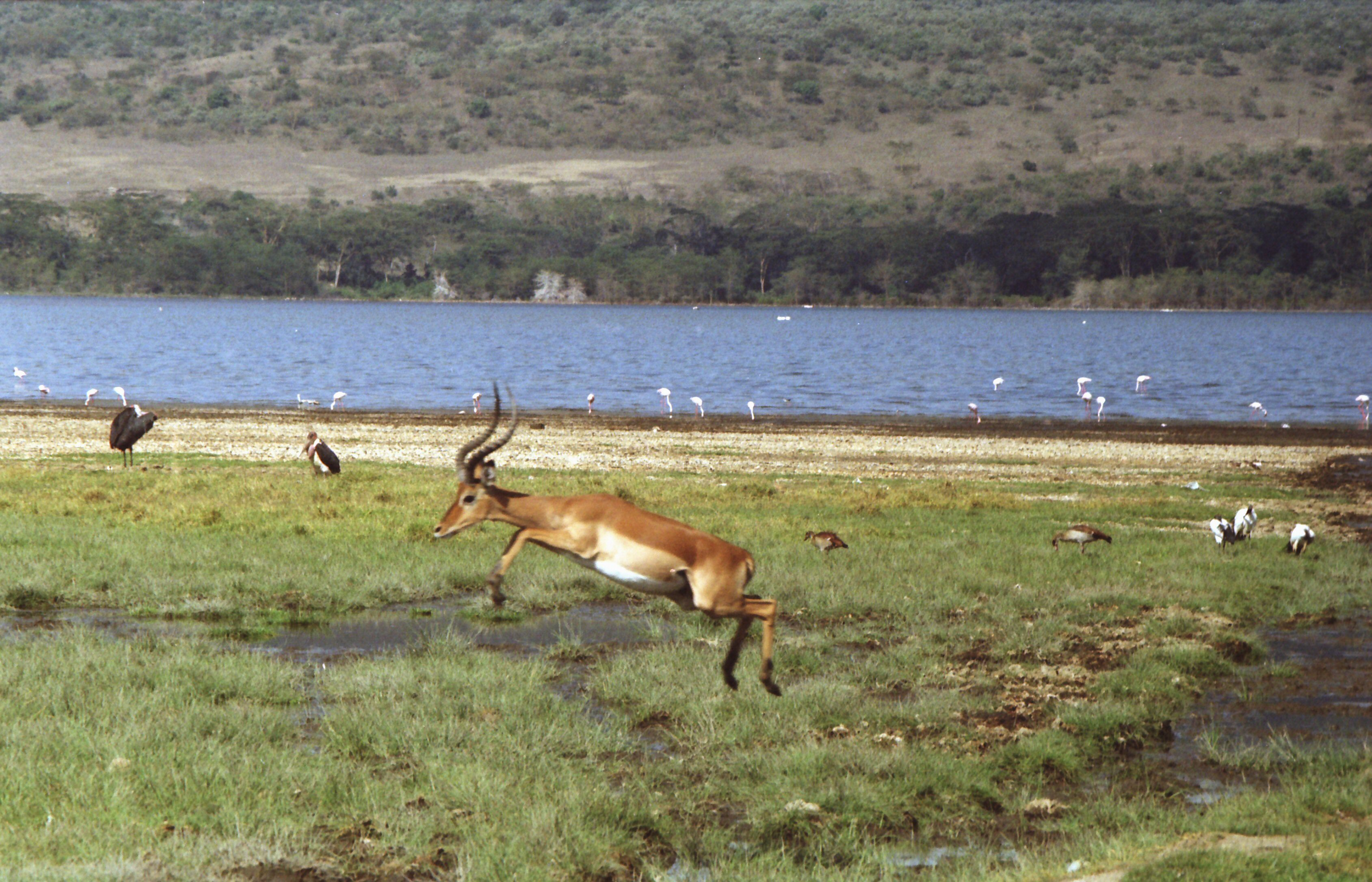 Arjen Mulder, juni 1999, Kenia.